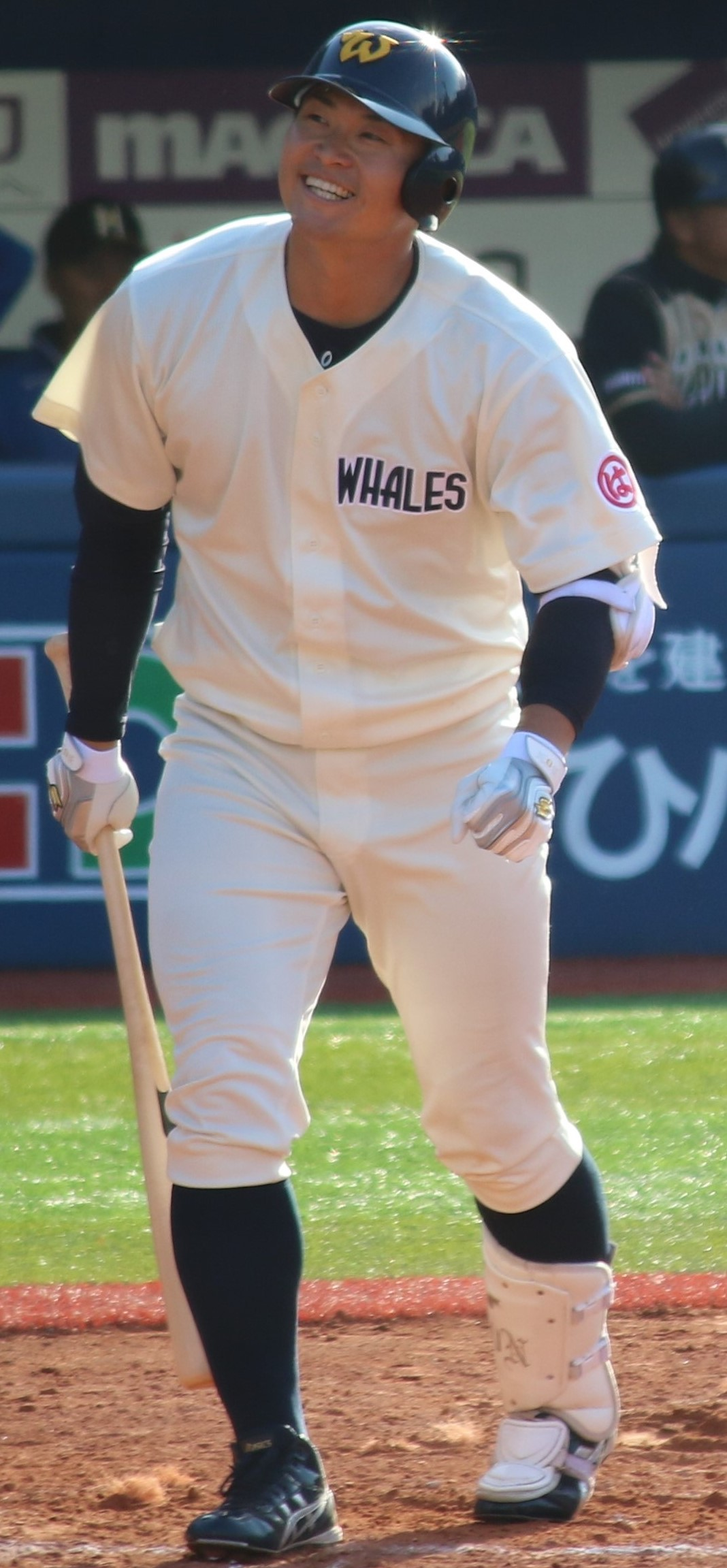 横浜DeNAベイスターズ 内野手 中井大介 横浜スタジアム